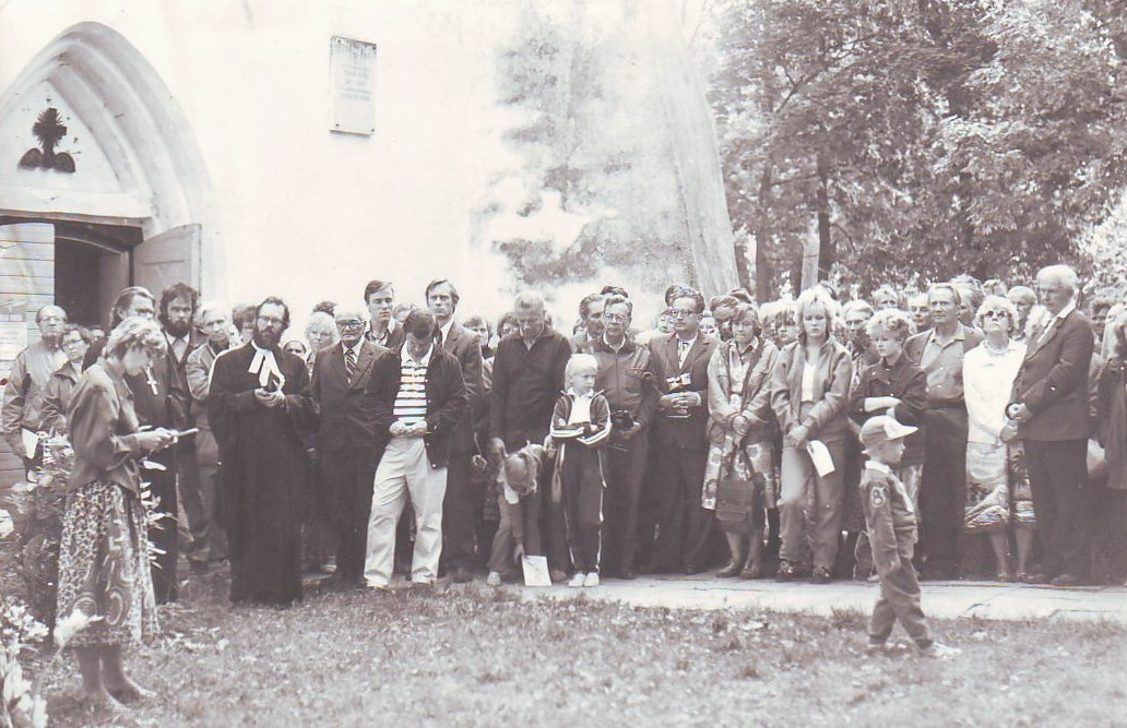 Esiplaanil hingekarjane Kalju Kukk ja Peeter Olesk.